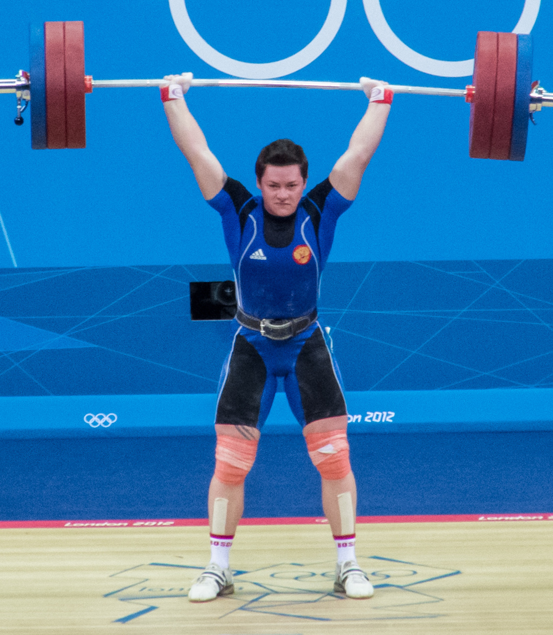 Natalia Zabolotnaya, 2012 Olympics